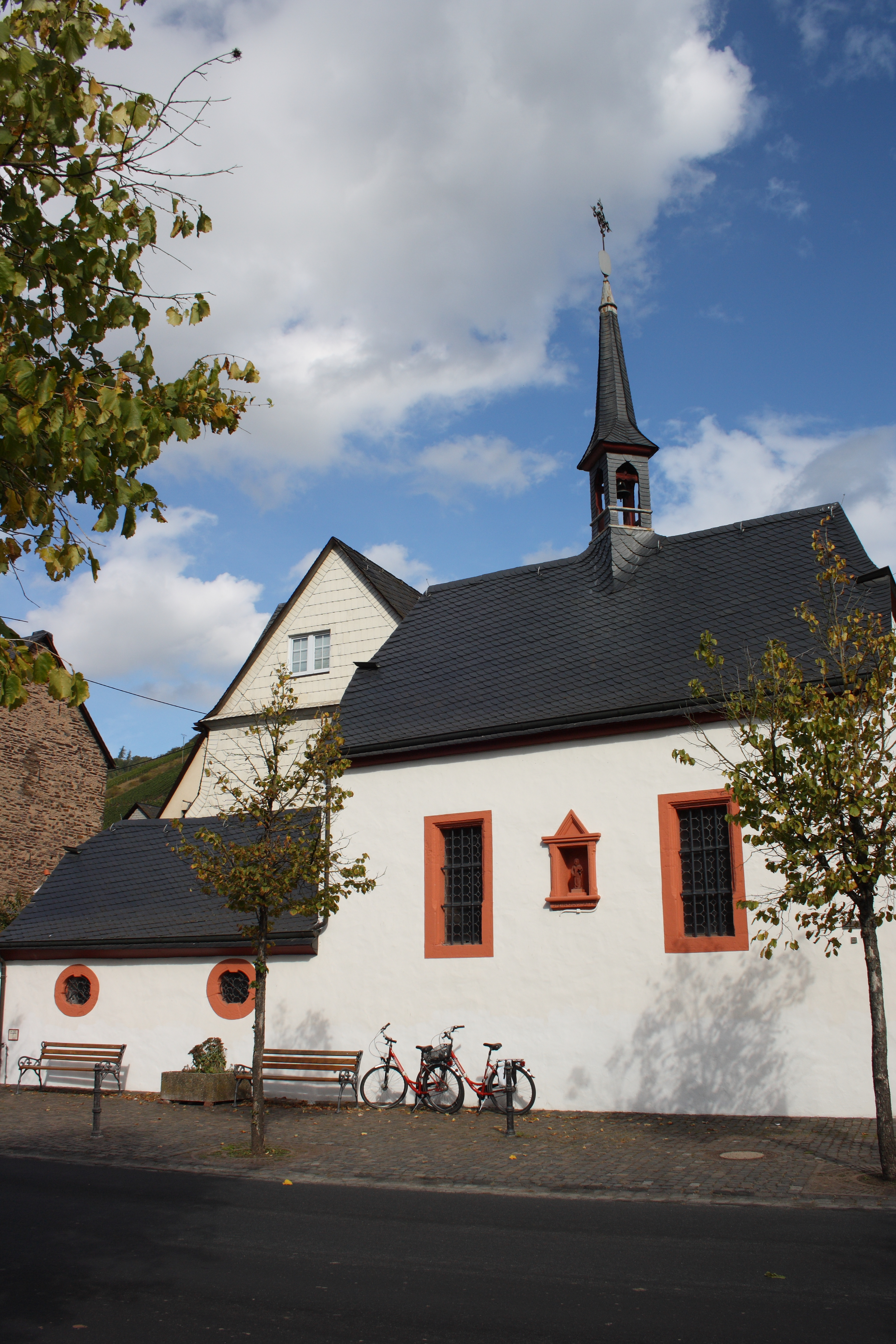 Katholische Kapelle Maria Einsiedeln und St. Meinrad in Ediger, einem Ortsteil von Ediger-Eller im Landkreis Cochem-Zell (Rheinland-Pfalz)